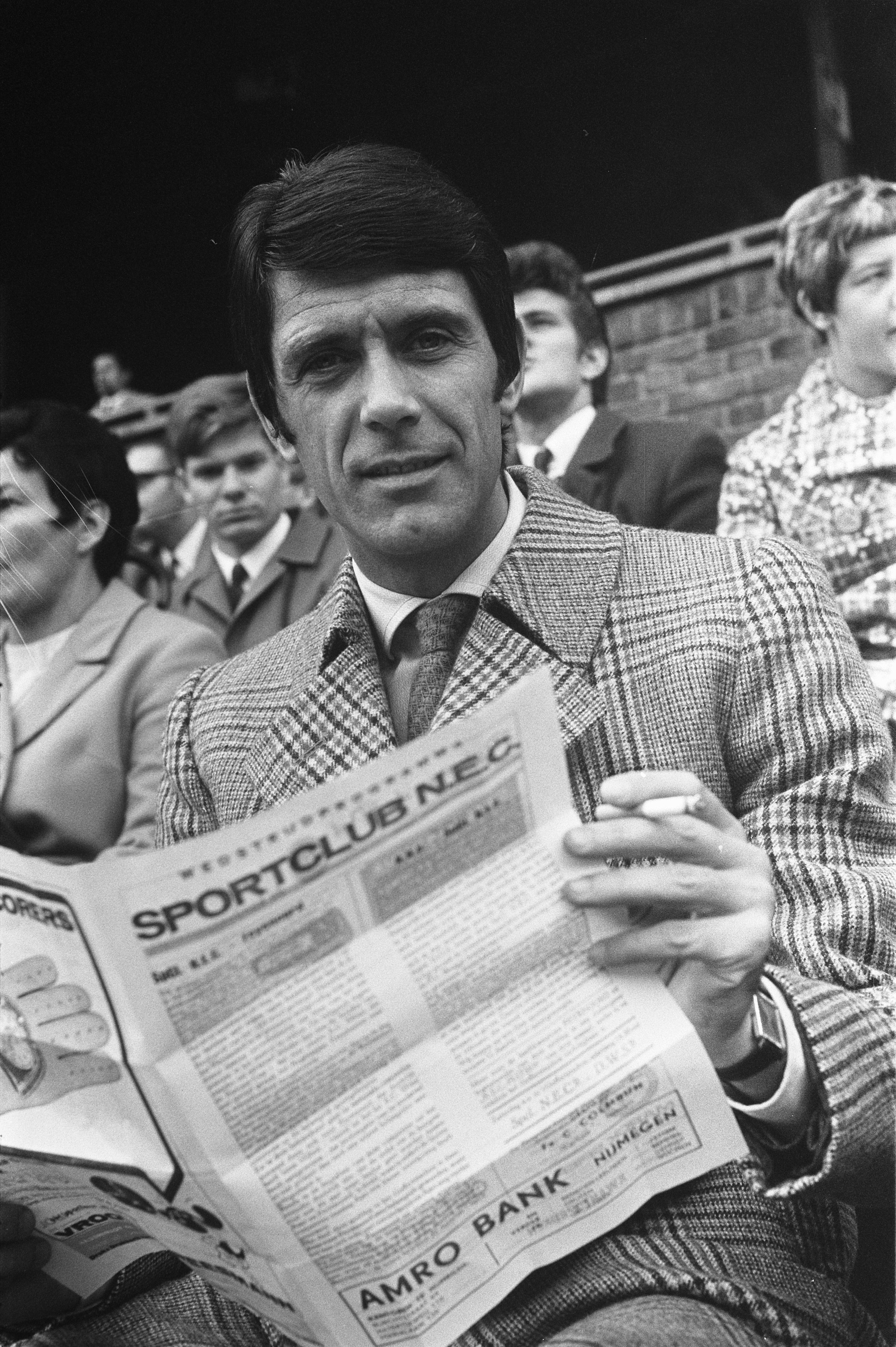 Collectie / Archief : Fotocollectie Anefo Reportage / Serie : [ onbekend ] Beschrijving : NEC tegen Feyenoord 0-2. A. C. Milaan hulptrainer Maldini op tribune Datum : 26 oktober 1969 Trefwoorden : sport, trainers, tribunes, voetbal Instellingsnaam : Feyenoord Fotograaf : Koch, Eric / Anefo Auteursrechthebbende : Nationaal Archief Materiaalsoort : Negatief (zwart/wit) Nummer archiefinventaris : bekijk toegang 2.24.01.05 Bestanddeelnummer : 922-9044